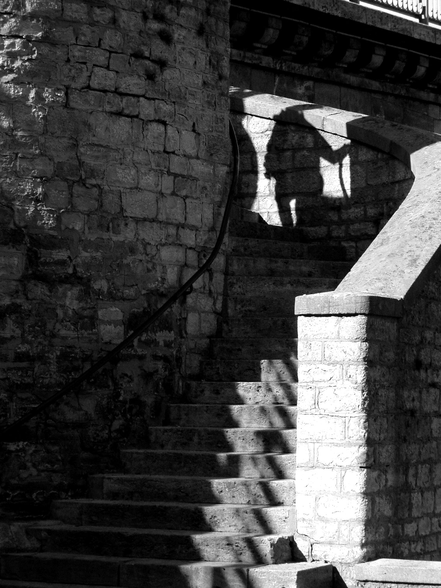 Der Gnom auf der Treppe